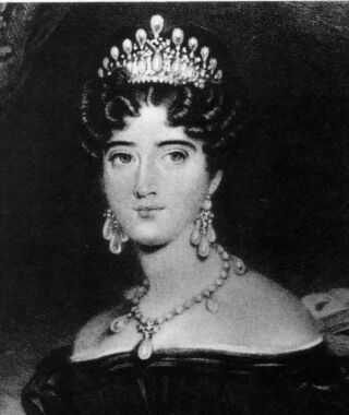 Augusta Karoline von Großbritannien (1822-1916)